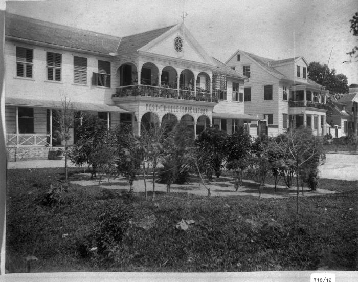 Foto. Post -en Telefoonkantoor, Paramaribo.